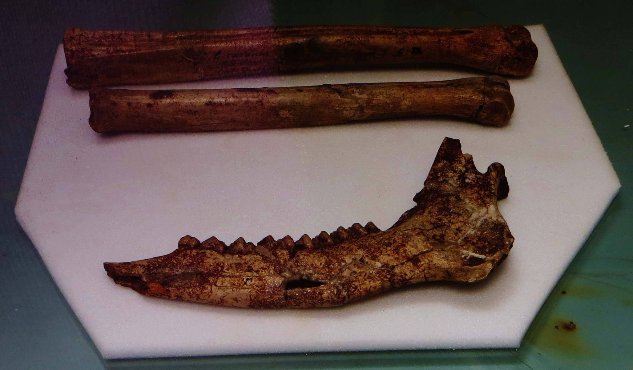 Fossil of Croizetoceras, an extinct mammal - Took the photo at Musee d'Histoire Naturelle, Paris